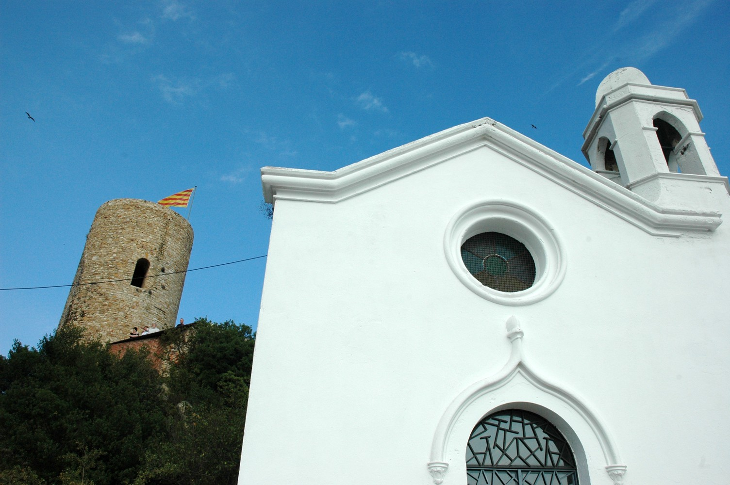 Ermita de Sant Joan de Blanes, Girona, (Catalunya).